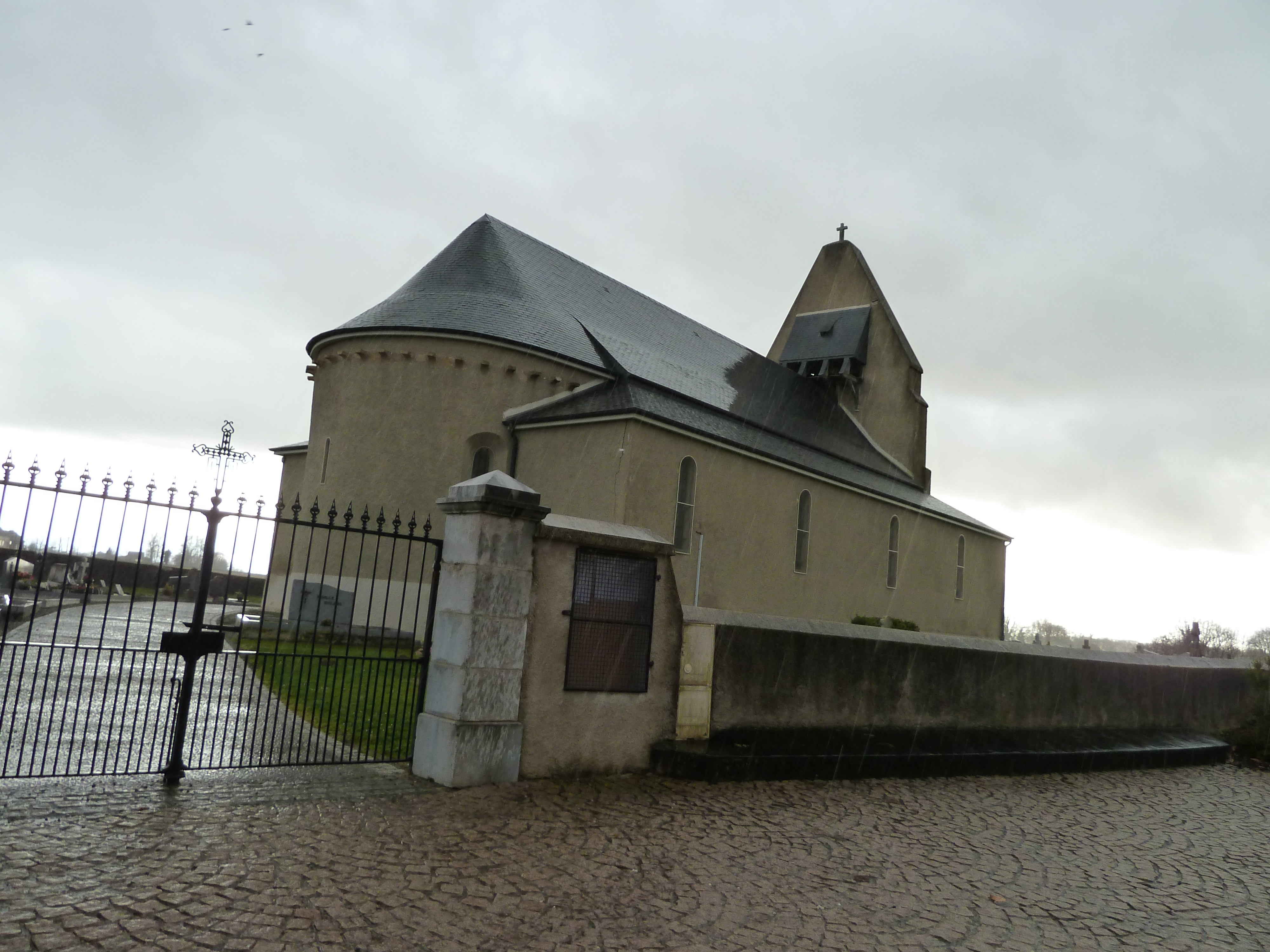 Église de Lespourcy